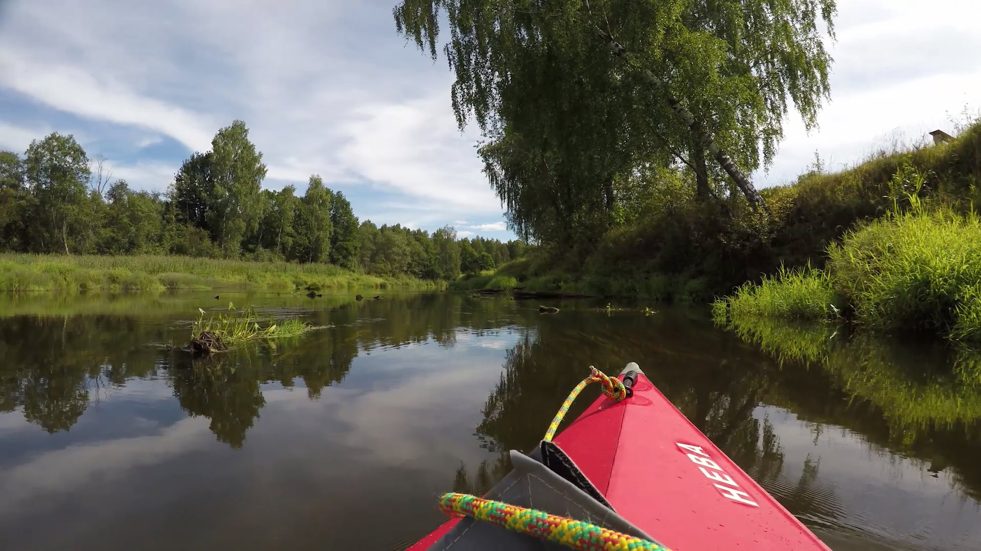 Река Медведица 2 (Тверская область)